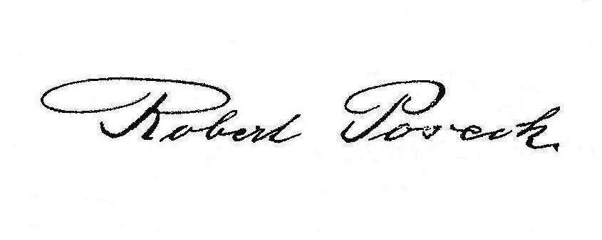 Signatur, Robert Poseck, Architekt in Berlin um 1900